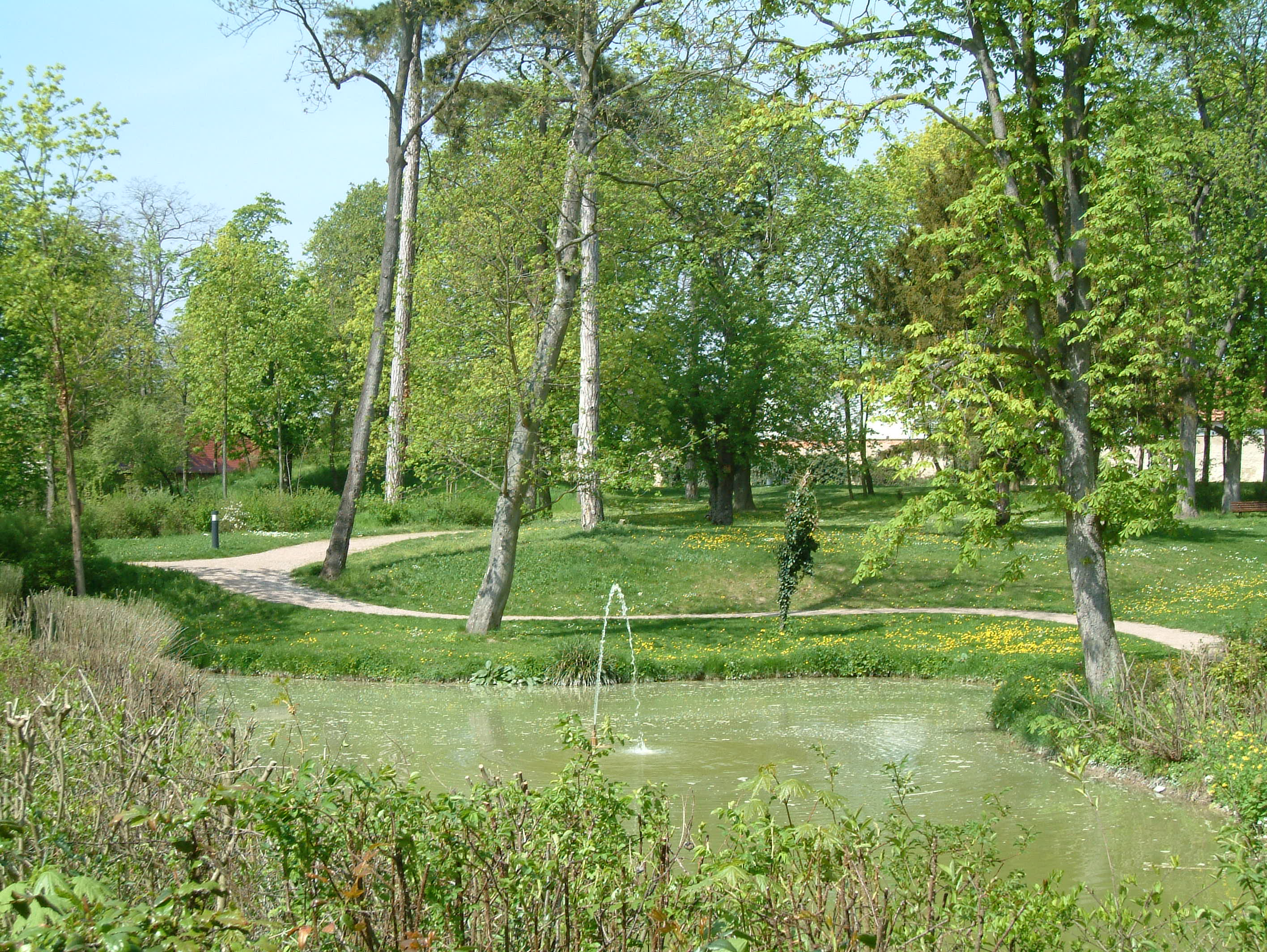 Schlosspark (Süd) zu Dirmstein, selbst fotografiert am 24.04.2006 und freigegeben durch Benutzer:Mundartpoet